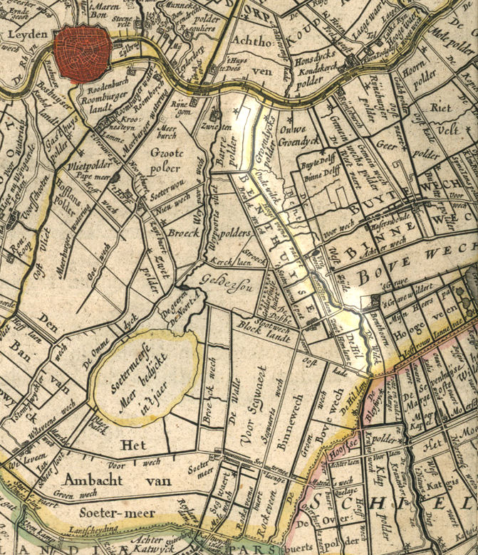 Het verloop van het riviertje de Wilck, te zien op een kaart van Rijnland en Amstelland uit de Atlas Maior uit 1665 (oorspronkelijke kaart: voor 1639).